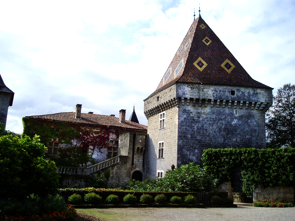 Vue du Château de la sour intérieure